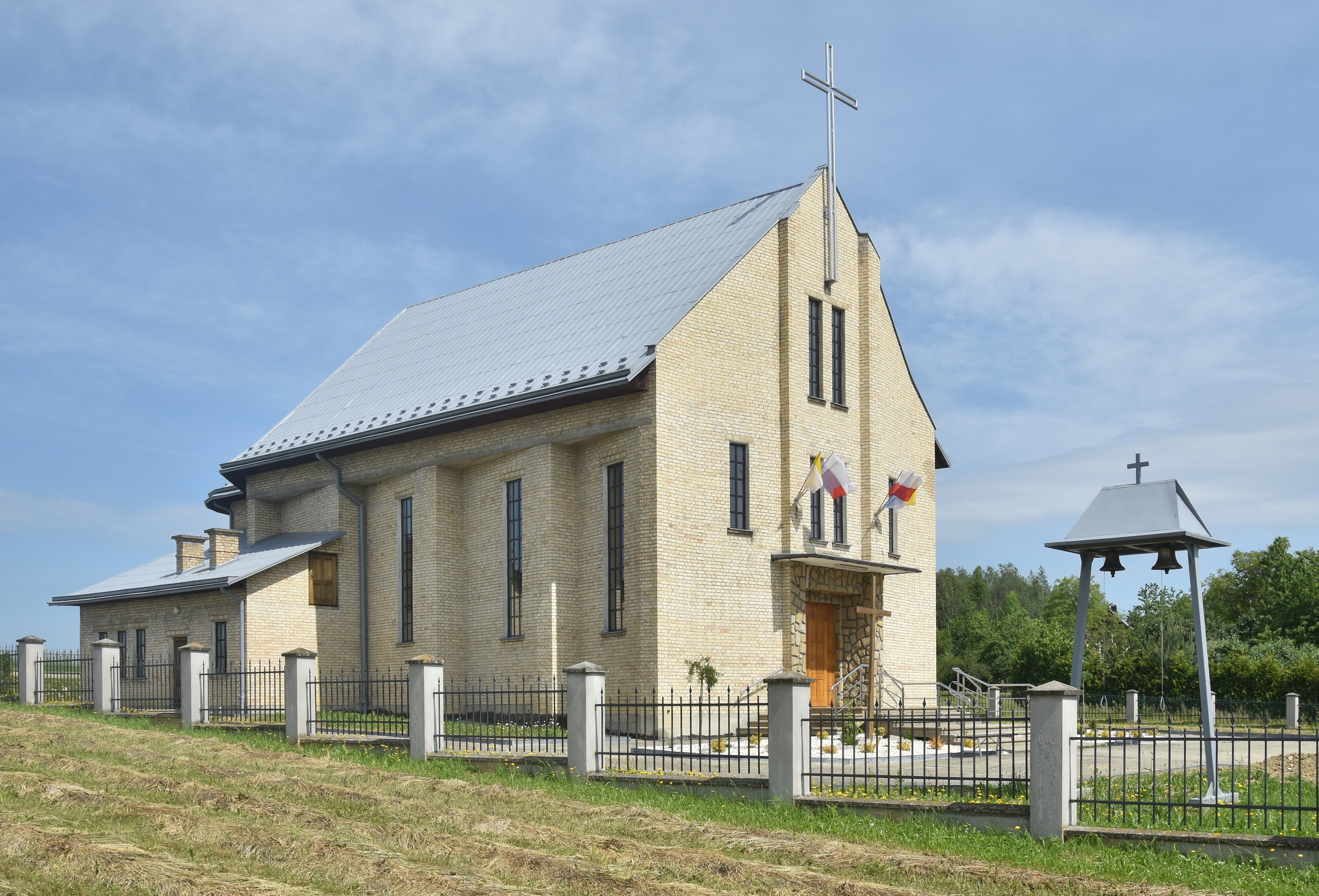 wieś Nowy Glinik